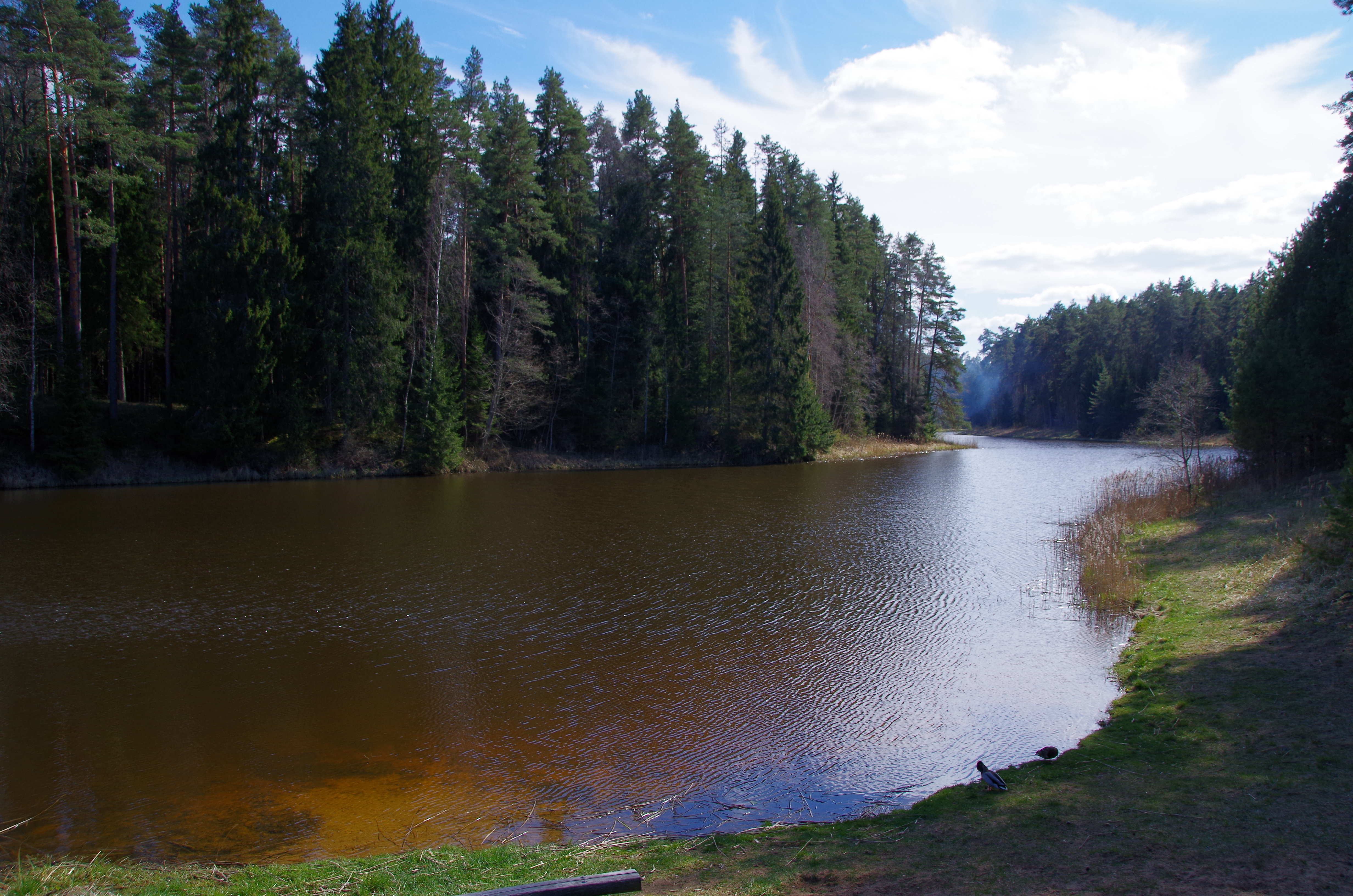 Elva jõgi (ka Ulila jõgi) on Emajõe parempoolne lisajõgi. Saab alguse Otepää Valgjärvest Põlva maakonnas.Jõe pikkus on 85,3 km